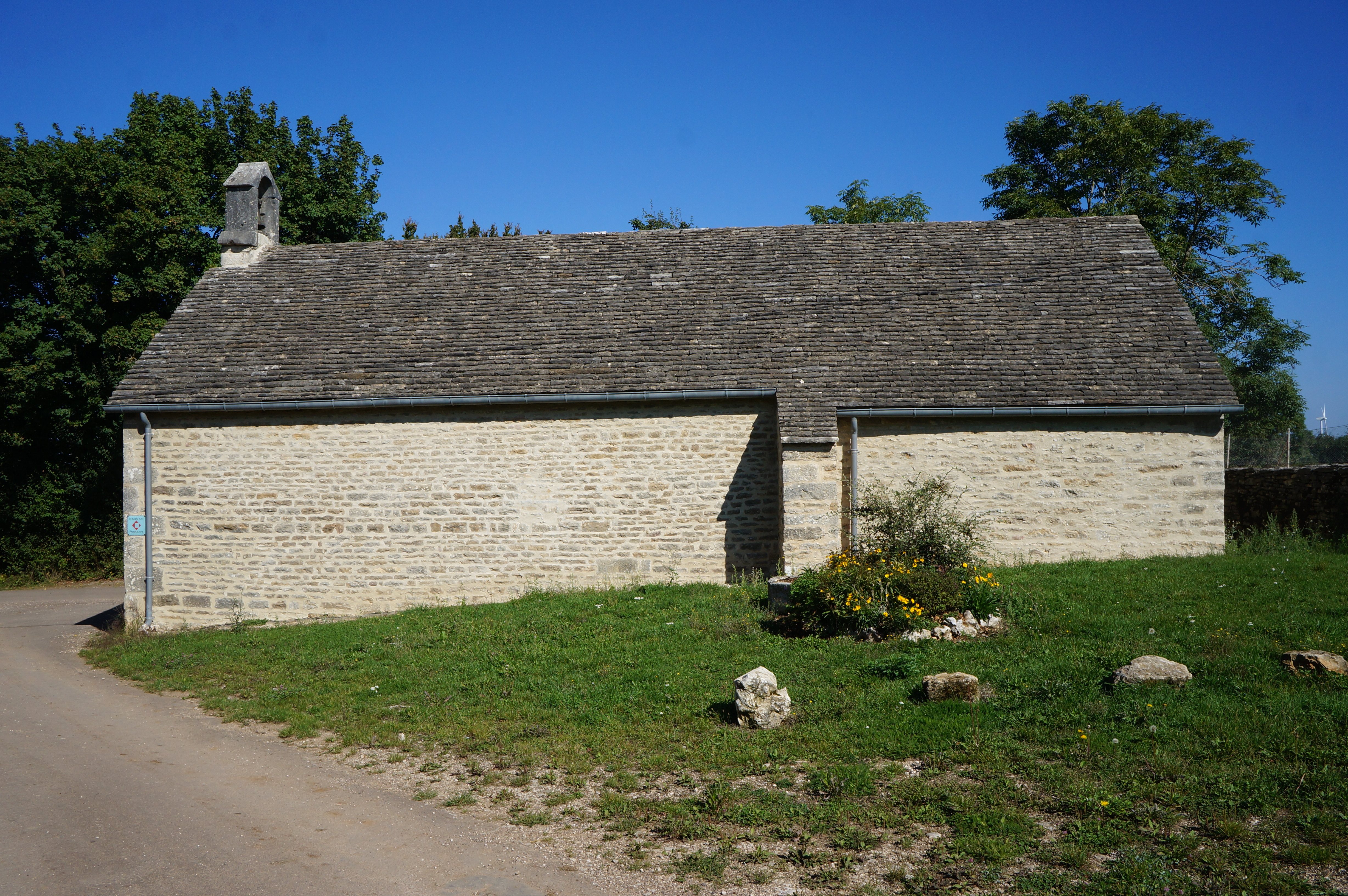 Turcey – Chapelle Saint-Hubert-de-la Rochotte. Côte-d'Or Bourgogne-Franche-Comté.- France